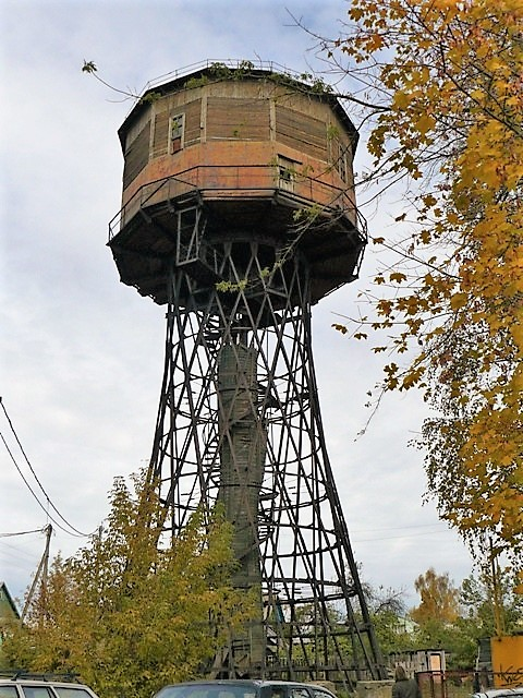 Шуховская водонапорная башня в Борисове. Фото путешествия по Беларуси.